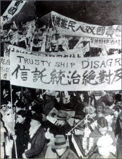 1945.12.30 신탁통치 반대 운동